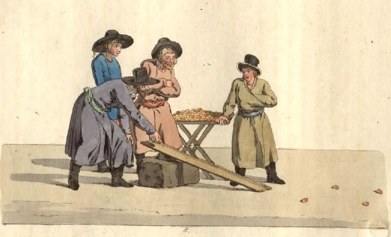 Катание яиц